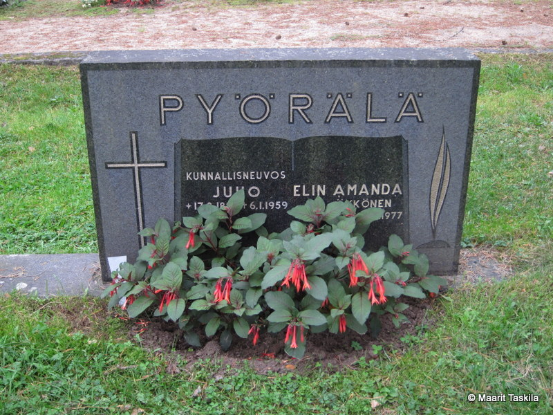 Juho Pyörälän hauta Vihannin Kankaraisten hautausmaalla